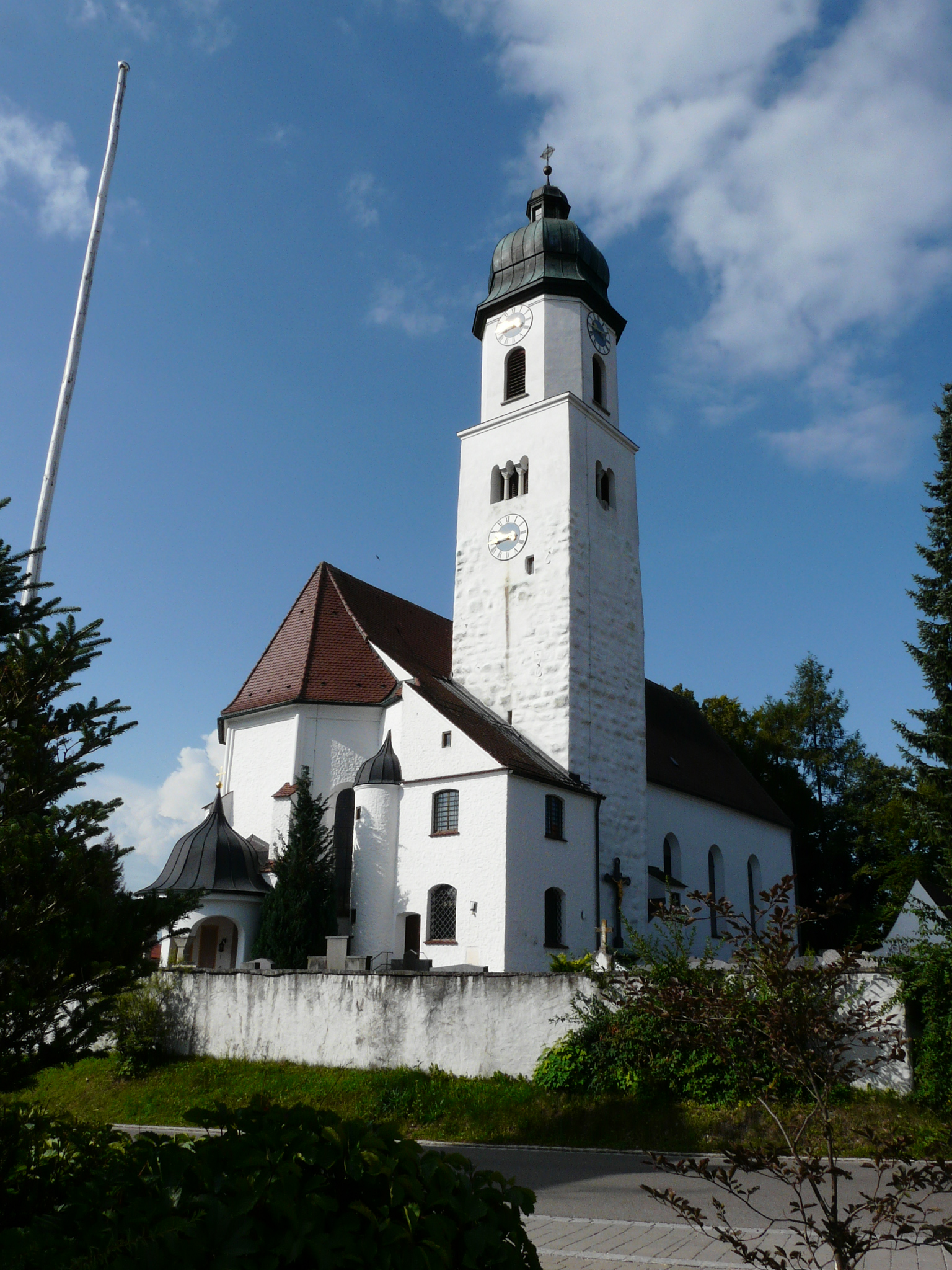 Kirche in Bidingen von Osten